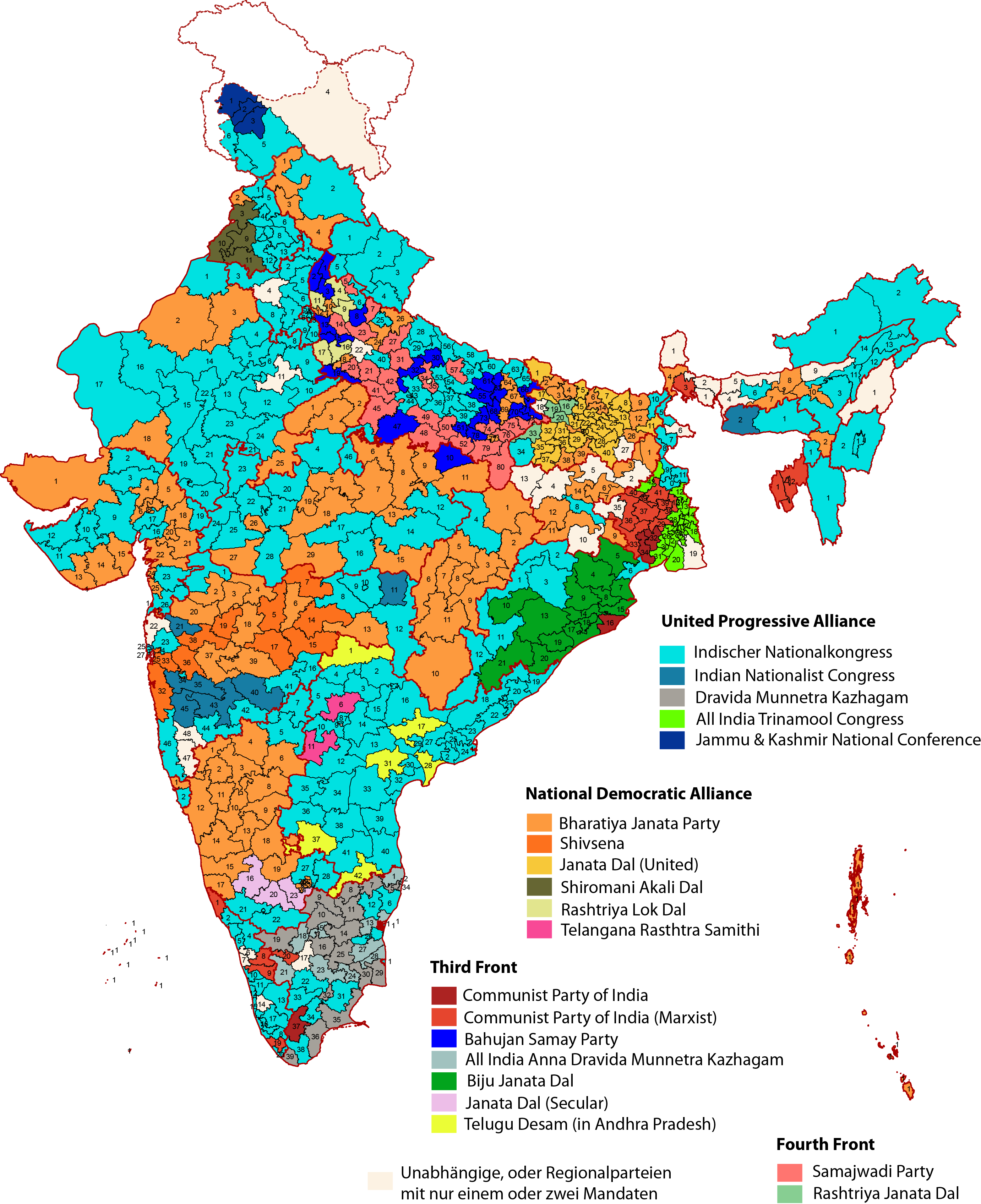 Ergebnis der Parlamentswahlen zur Lok Sabha in Indien im April und Mai 2009 nach Wahlkreisen. Bei Parteien, die nur in einem Bundesland Mandate gewonnen haben, ist dies hier extra vermerkt. Die Nummerierung der Wahlkreise entspricht der Nummerierung durch die IEC. 1. United Progressive Alliance Indischer Nationalkongress Dravida Munnetra Kazhagam (in Tamil Nadu) Nationalist Congress Party All India Trinamool Congress (in Westbengalen) Jammu & Kashmir National Conference (in Jammu und Kashmir) 2. National Democratic Alliance Bharatiya Janata Party Janata Dal (United) Shiv Sena (in Maharashtra) Rashtriya Lok Dal (in Uttar Pradesh) Shiromani Akali Dal (im Punjab) Telangana Rashtra Samithi (in Andhra Pradesh) 3. Third Front Kommunistische Partei (Marxisten) Kommunistische Partei Indiens Bahujan Samaj Party (in Uttar Pradesh) Biju Janata Dal (in Orissa) All India Anna Dravida Munnetra Kazhagam (in Tamil Nadu) Telugu Desam Party (in Andhra Pradesh) Janata Dal (Secular) 4. Fourth Front Samajwadi Party (in Uttar Pradesh) Rashtriya Janata Dal (in Bihar) 5. Unabhängige Kandidaten oder Regionalparteien mit nur einem oder zwei Mandaten Andere